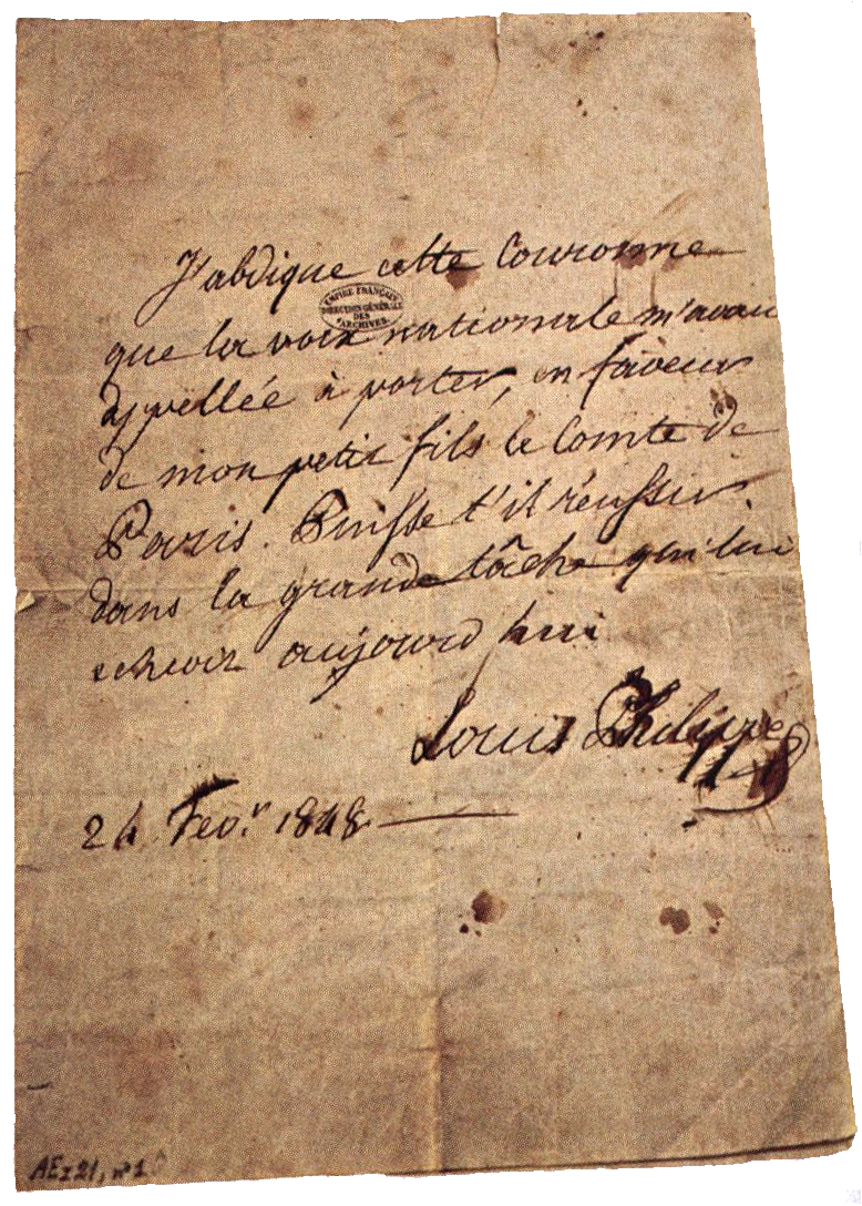 Abdication de Louis-Philippe le 24 février 1848. "J'abdique cette couronne que la voix nationale m'avait appelé à porter, en faveur de mon petit fils le Comte de Paris. Puisse-t-il réussir dans la grande tâche qui lui échoit aujourd'hui."